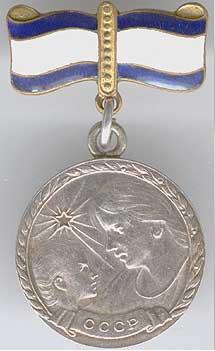 «Медаль материнства» I степени из серебра (в названии файла при загрузке была допущена ошибка, перепутано с медалью 2 степени из бронза)